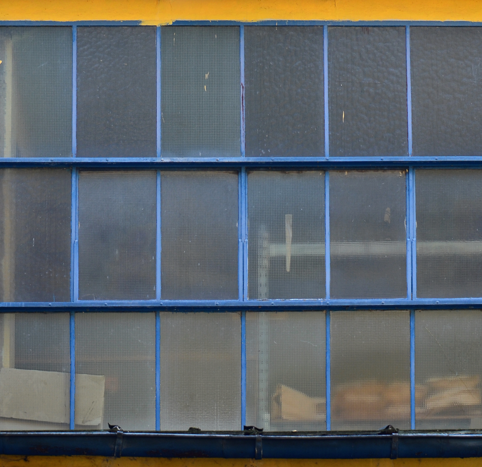 AMCO-Fabrikerweiterungsgebäude, Fensterband auf der Ostseite im 1. Obergeschoss